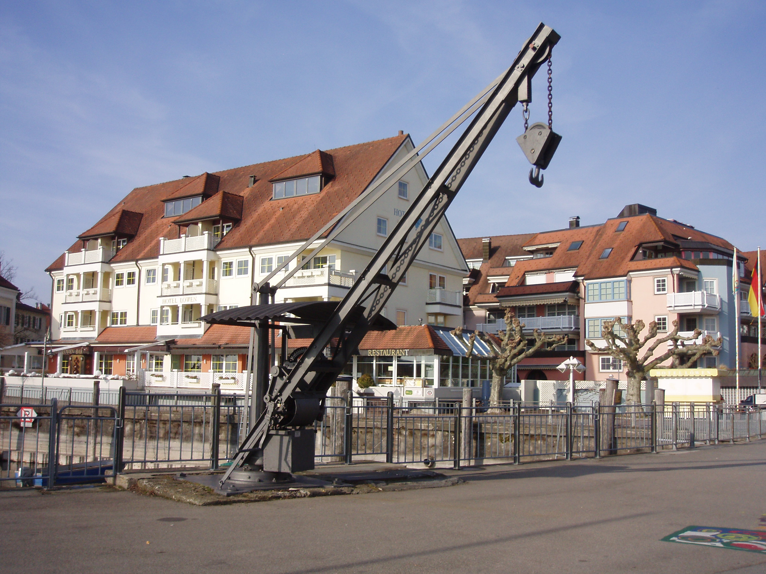 Kleiner Hafenkran in Langenargen, Baujahr 1909